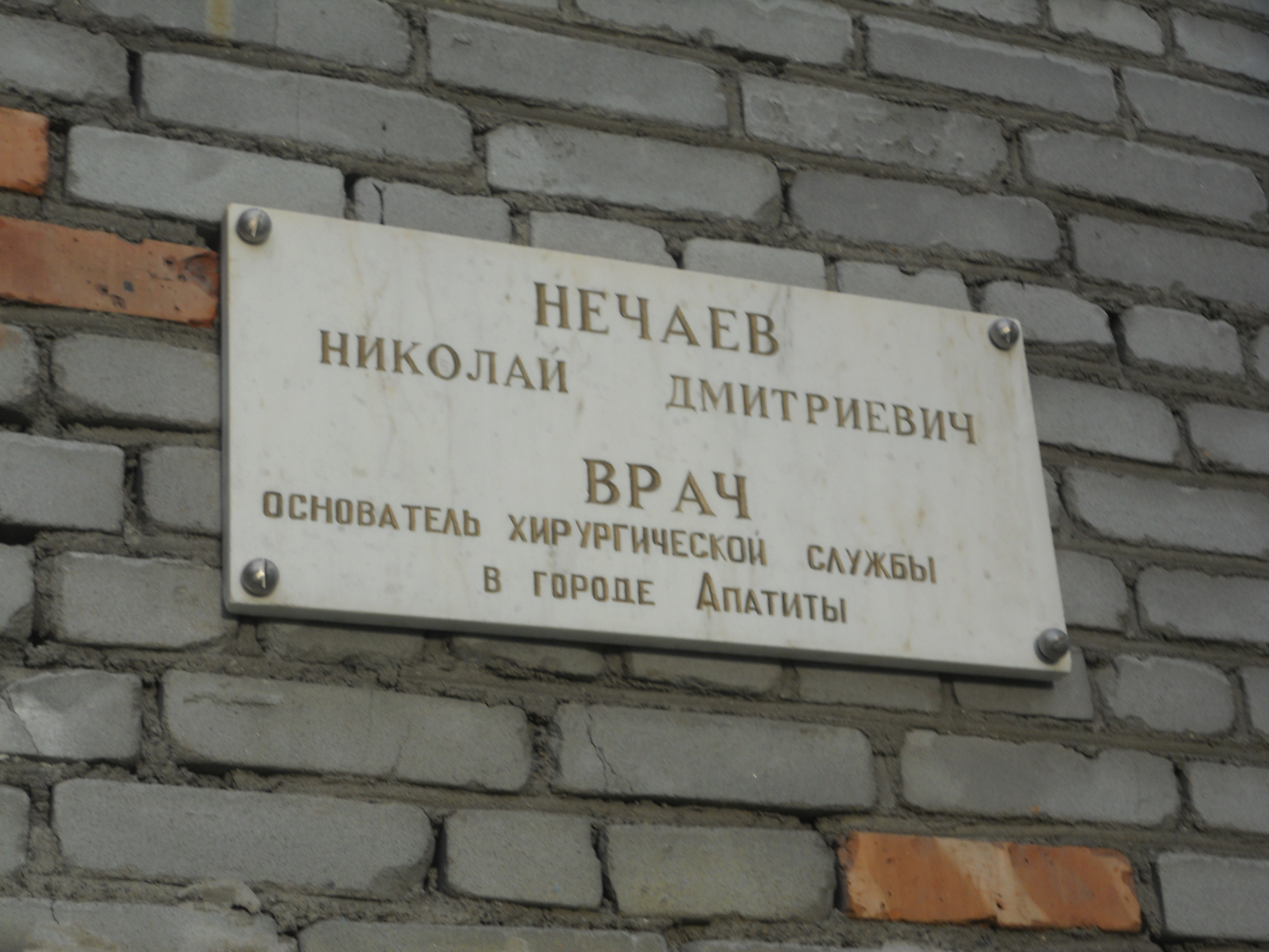 Памятная доска Нечаеву Н. Д.